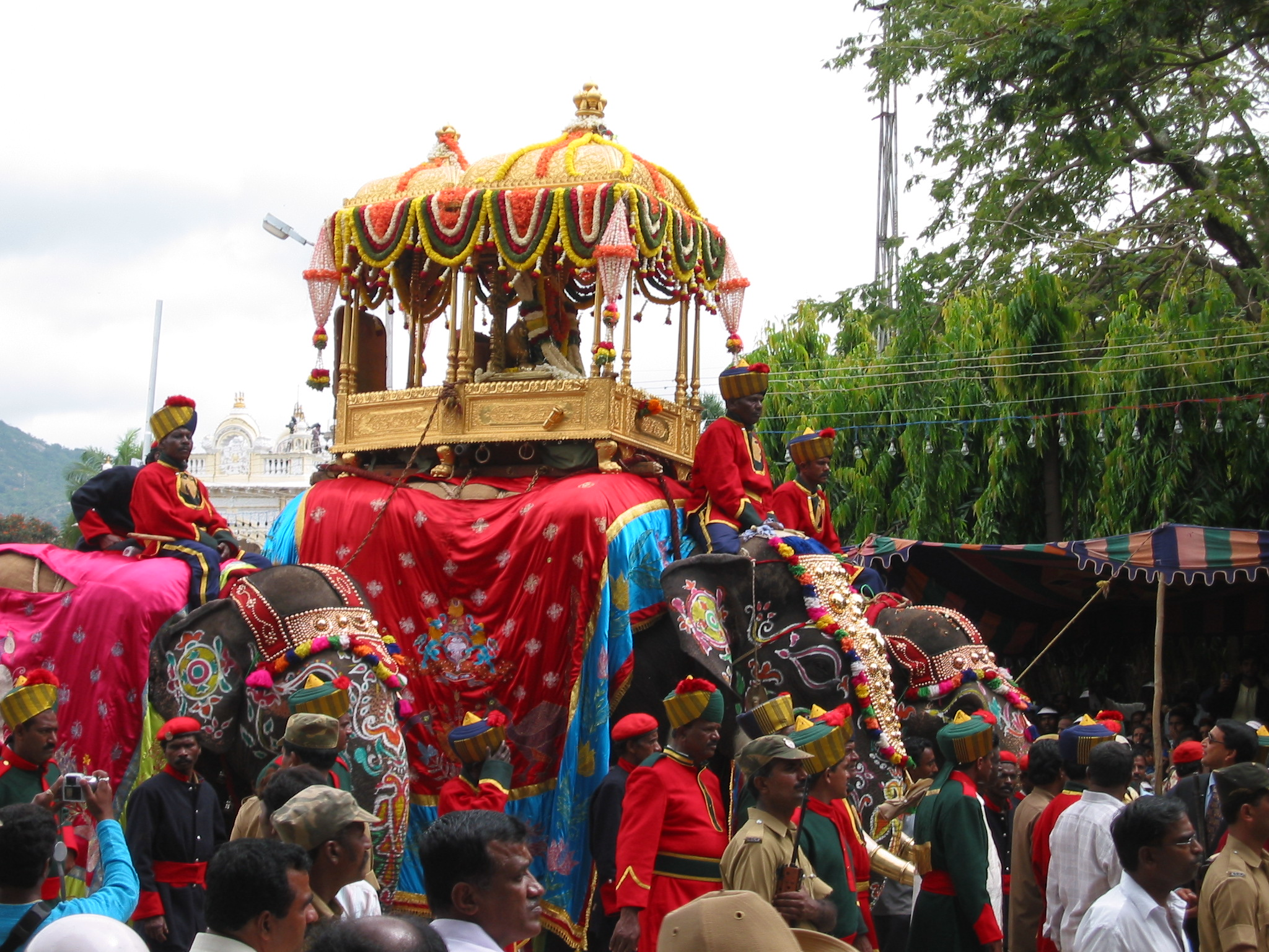 மைசூர் நகரில் தசரா பண்டிகையை முன்னிட்டு நடக்கும் ஊர்வலத்தில் ஒரு காட்சி (வருடம்: 2005)